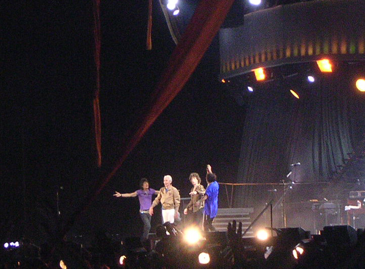 fotografia dei Rolling Stones al concerto di Nizza (Francia) il 08-08-2006